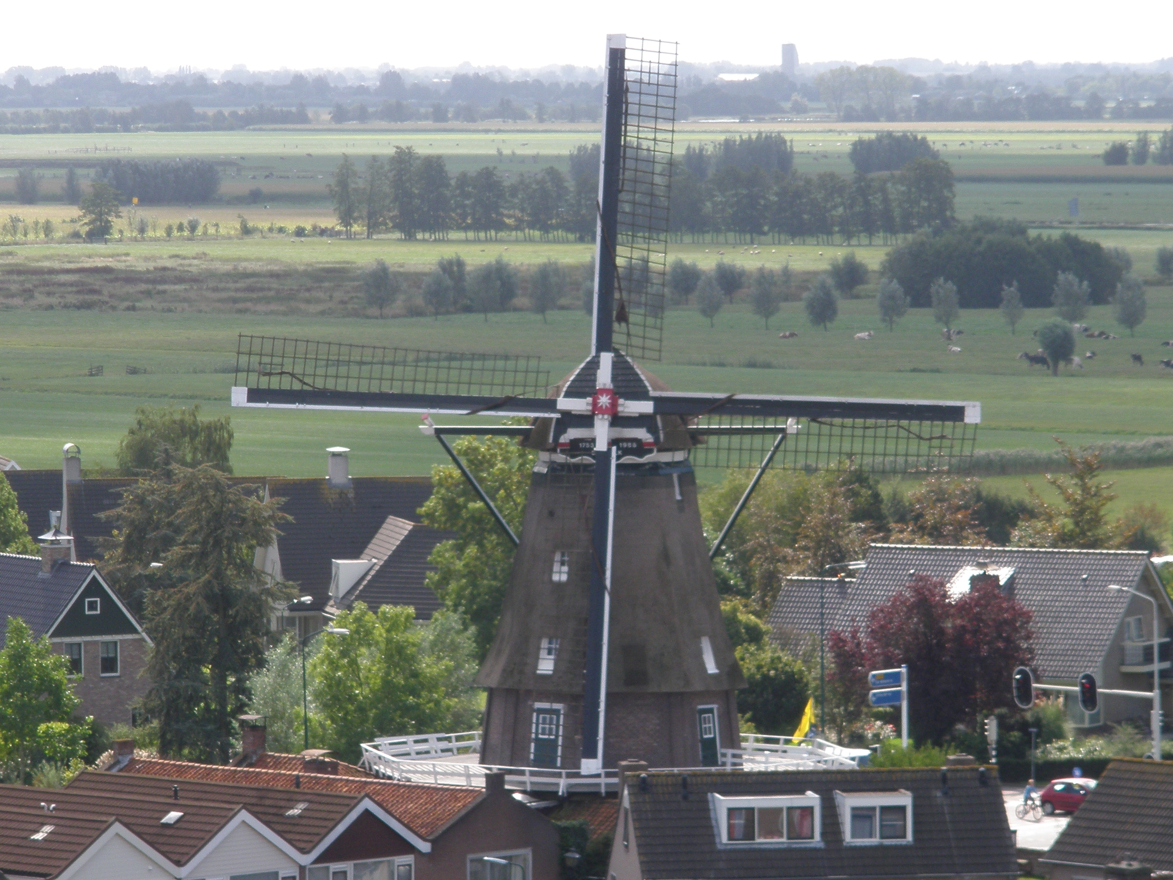 Molen De Valk in Montfoort gezien vanaf de toren van de Grote of Sint-Janskerk.